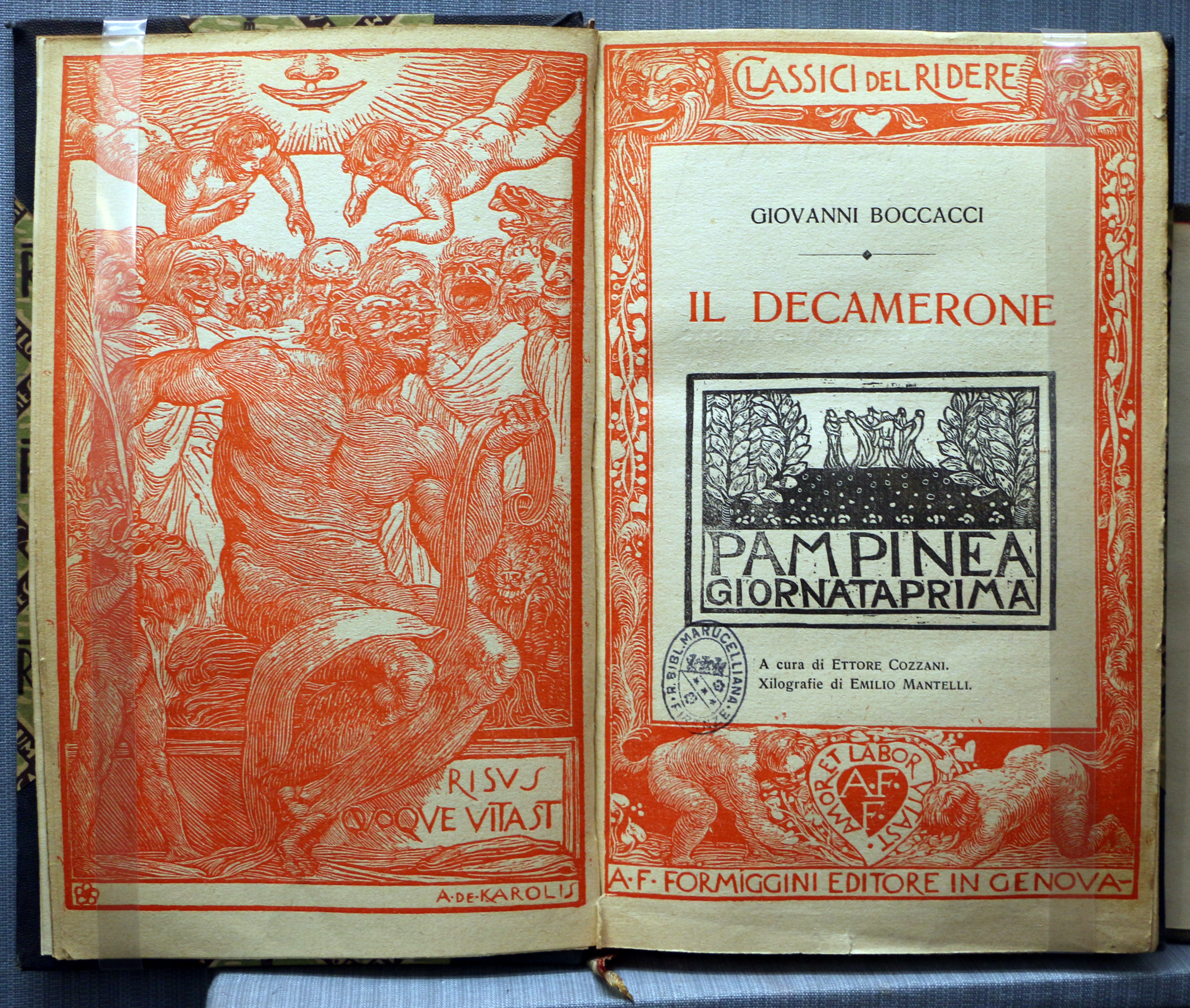 Biblioteca Marucelliana This is a photo of a monument which is part of cultural heritage of Italy.